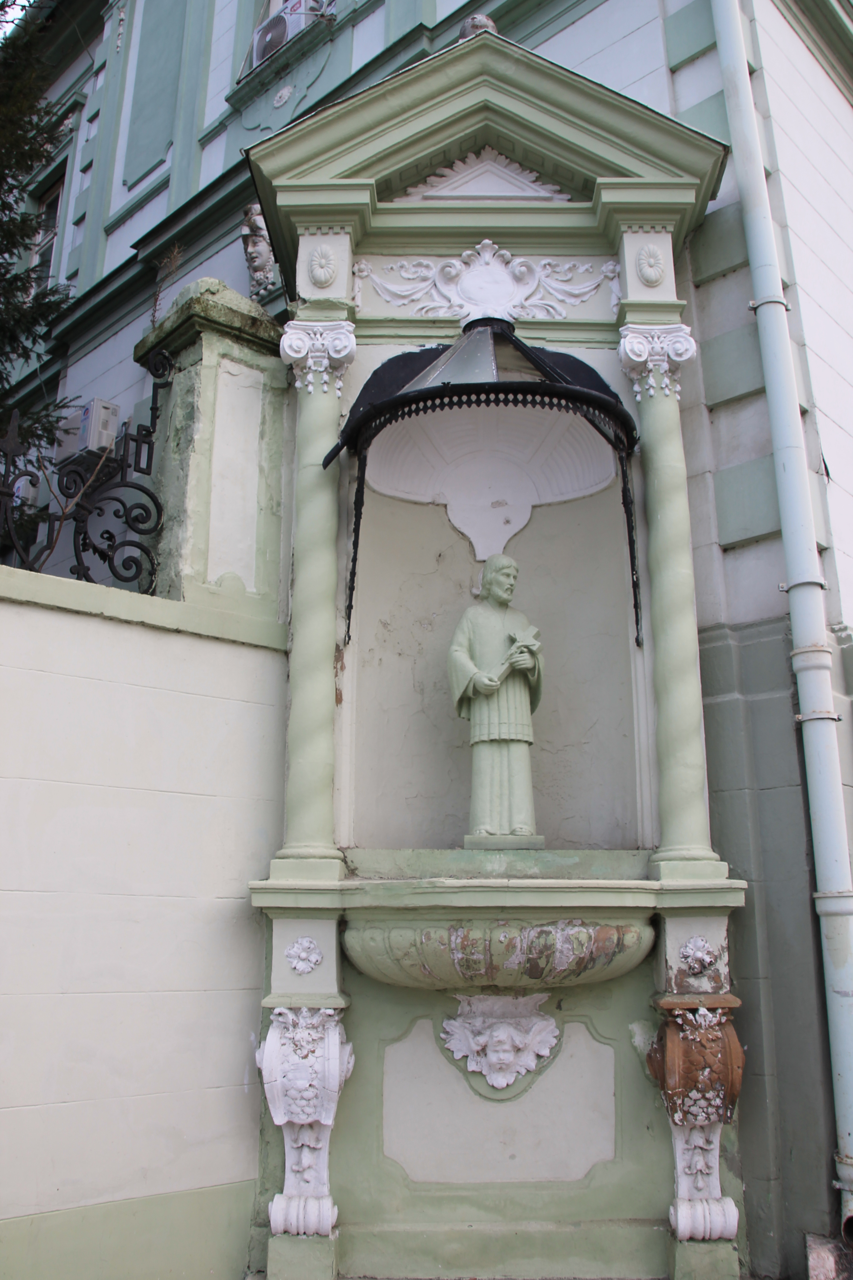 Staro jezgro Zrenjanina